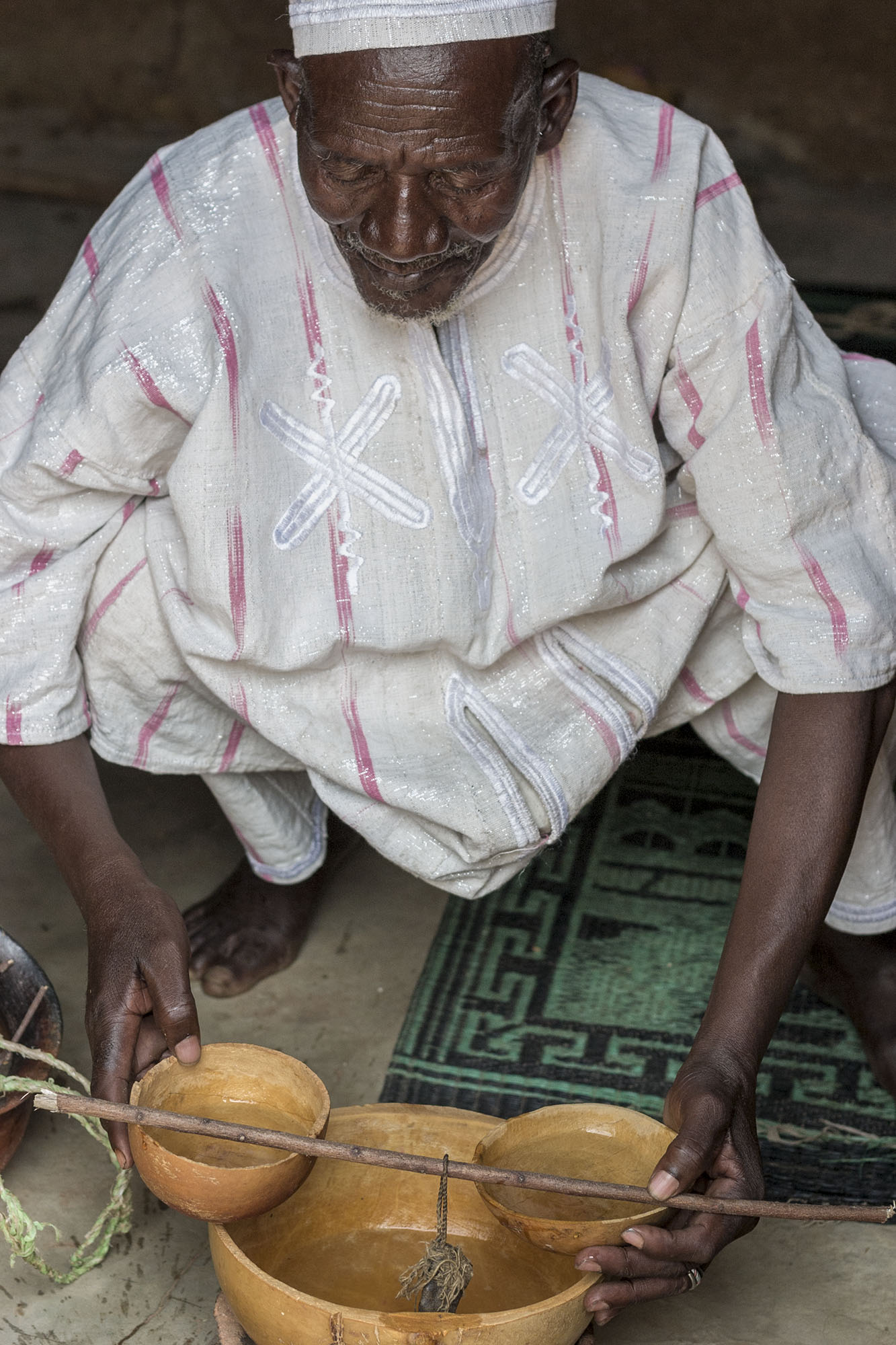 Un guérisseur traditionnel de Banfora au Burkina Faso lors d'une consultation d'un patient. This is an image of "African people at work" from Burkina Faso